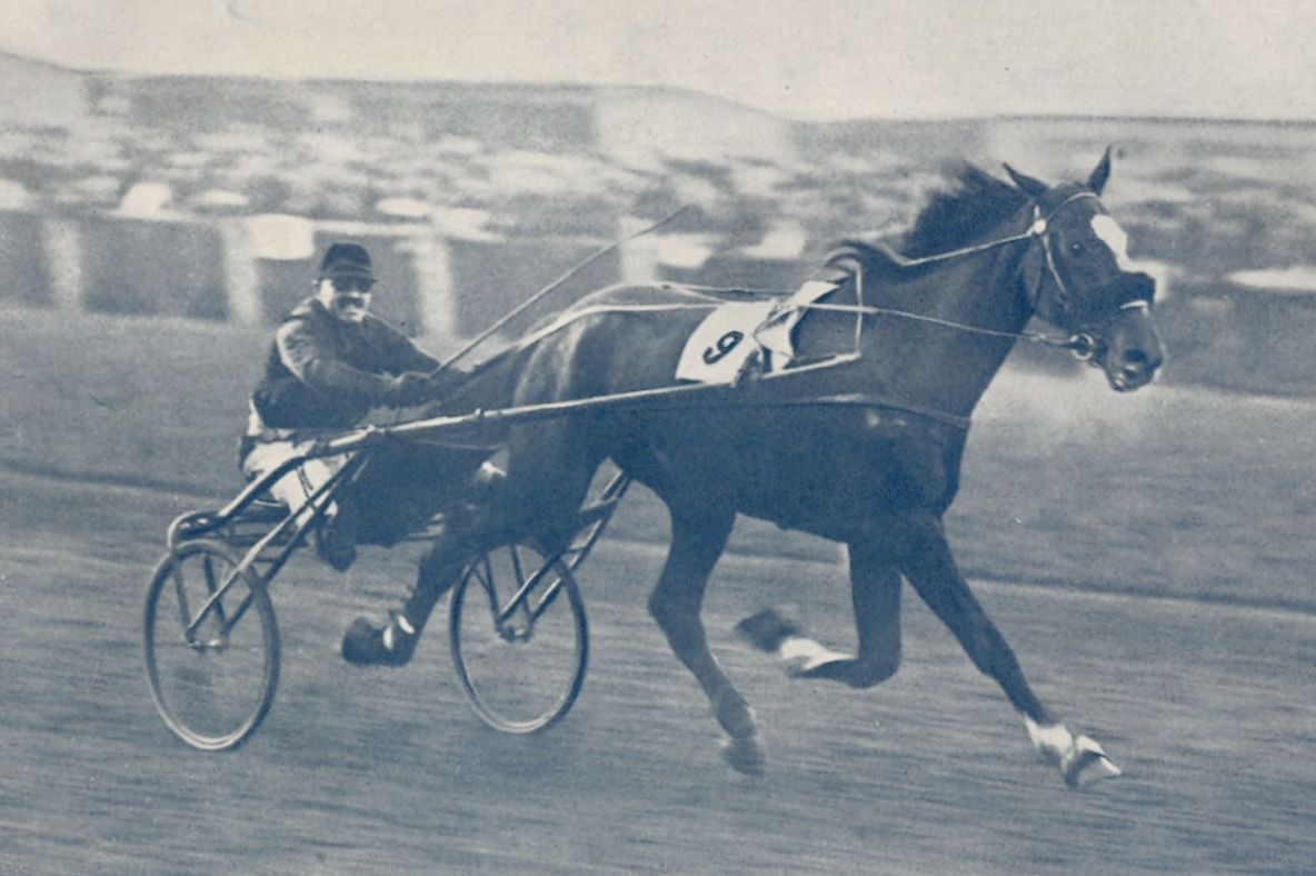 Uranie à Vincennes le 22 janvier 1928, le jour de sa troisième victoire au Prix d'Amérique.